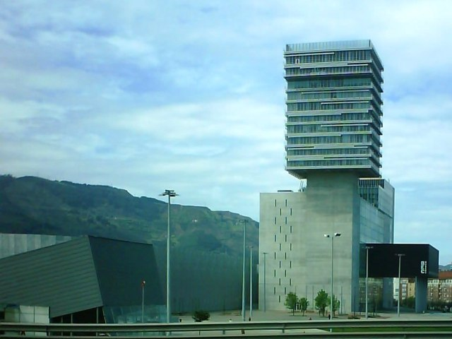 Ansioko geltokia, BEC ondoan / Estación de Ansio, junto al BEC